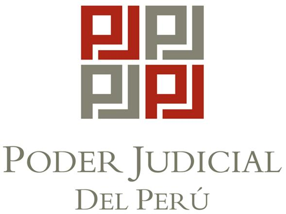 Logotipo del Poder Judical del Peru